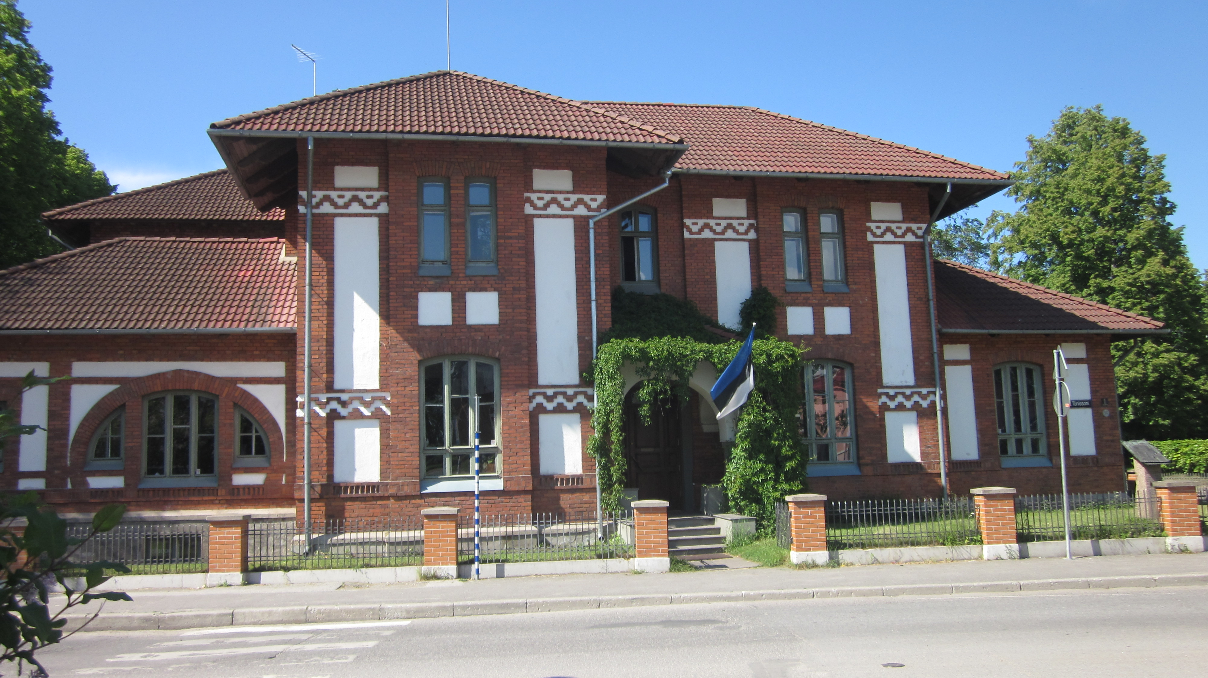 EÜSi hoone Tartus